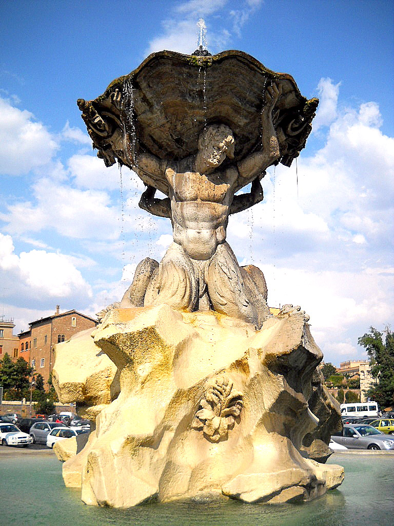 Fontana dei Tritoni